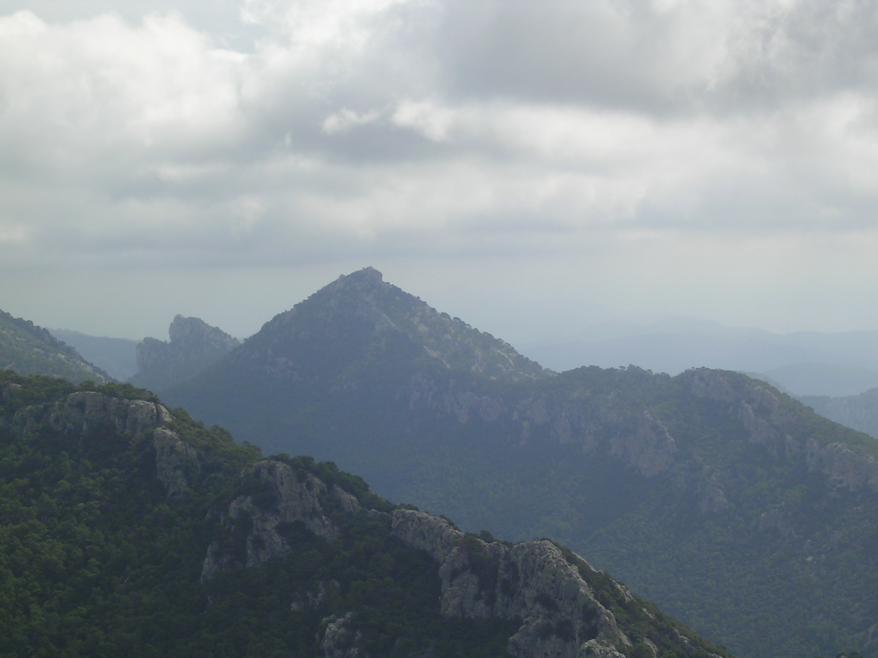 Puig de n'Alí des del cim dels Tossals. Mallorca